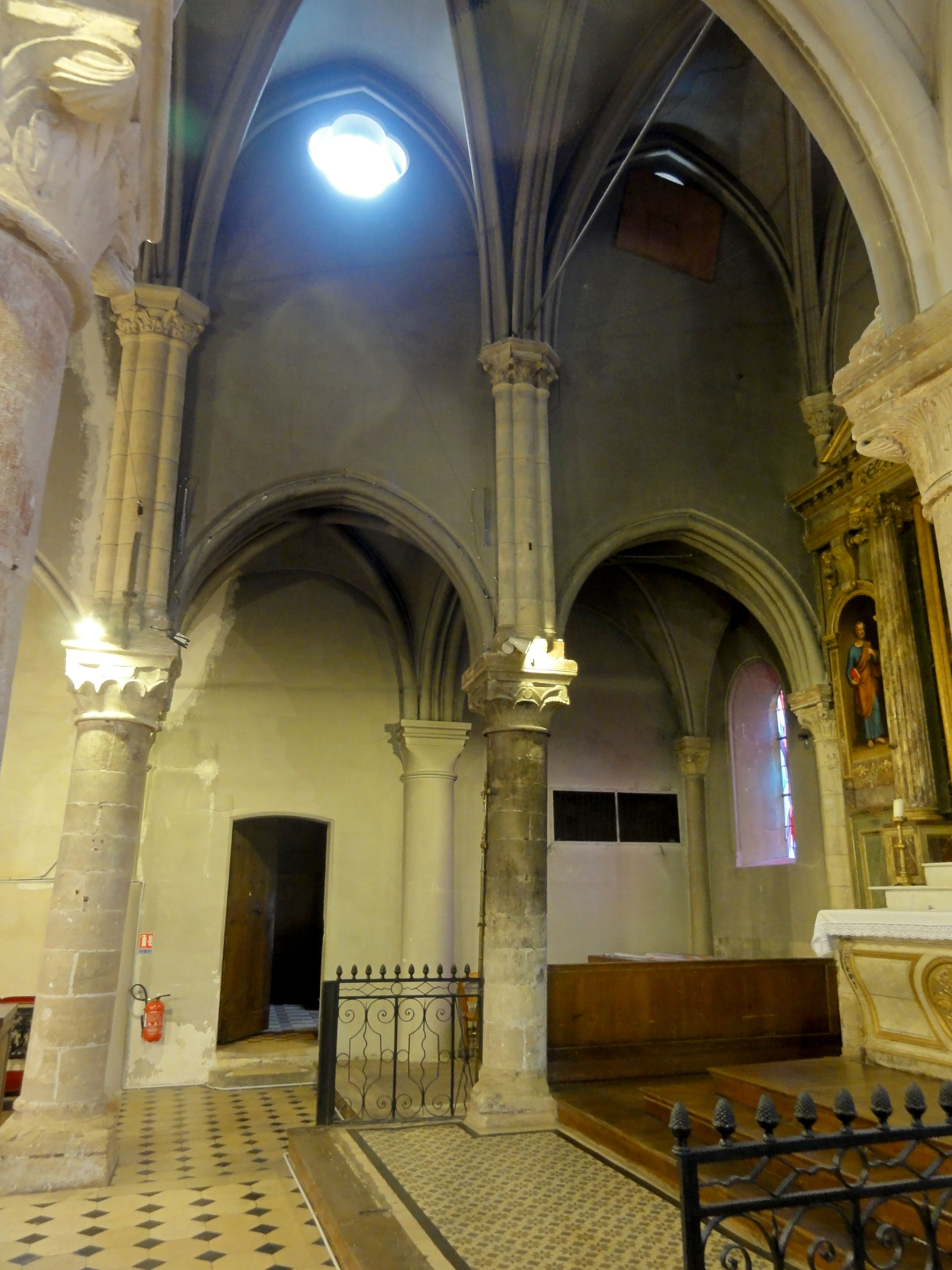 Chœur, élévation nord.